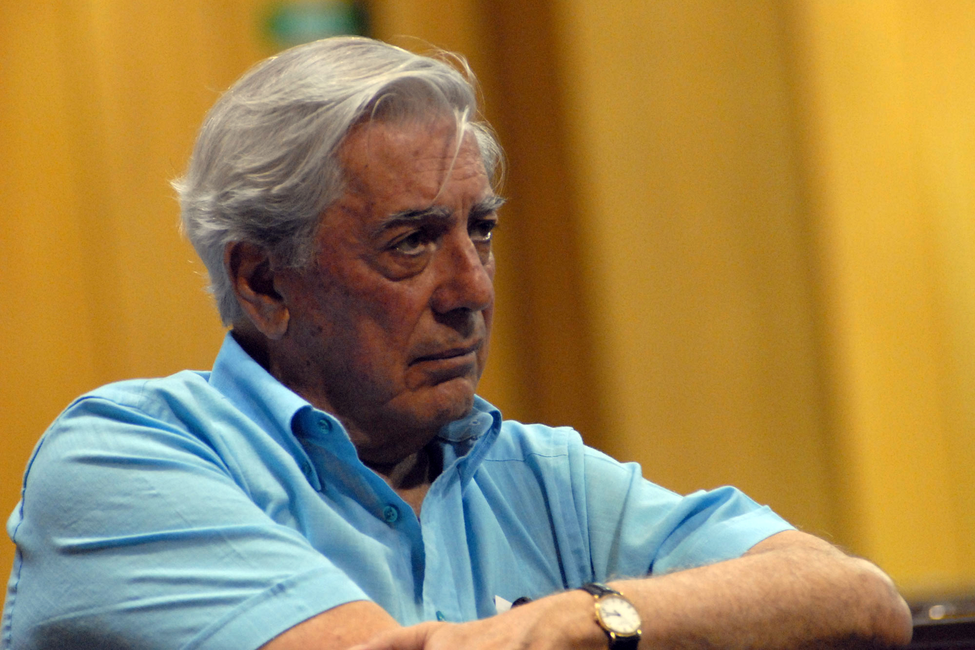 Jorge Mario Pedro Vargas Llosa (Arequipa, Perú, 28 de marzo de 1936), marqués de Vargas Llosa,1 2 más conocido como Mario Vargas Llosa, es un escritor en lengua española, uno de los más importantes novelistas y ensayistas contemporáneos. Peruano de nacimiento, cuenta también con la nacionalidad española, que obtuvo en 1993.3 Su obra ha cosechado numerosos premios, entre los que destacan el Nobel de Literatura en 2010, «por su cartografía de las estructuras del poder y sus imágenes mordaces de la resistencia del individuo, su rebelión y su derrota»;4 5 6 el Premio Cervantes (1994) y el Premio Príncipe de Asturias de las Letras (1986), entre otros. Al igual que otros autores latinoamericanos, ha participado en política, siendo defensor de las ideas liberales. Fue candidato a la presidencia del Perú en 1990 por la coalición política de centroderecha Frente Democrático (Fredemo).